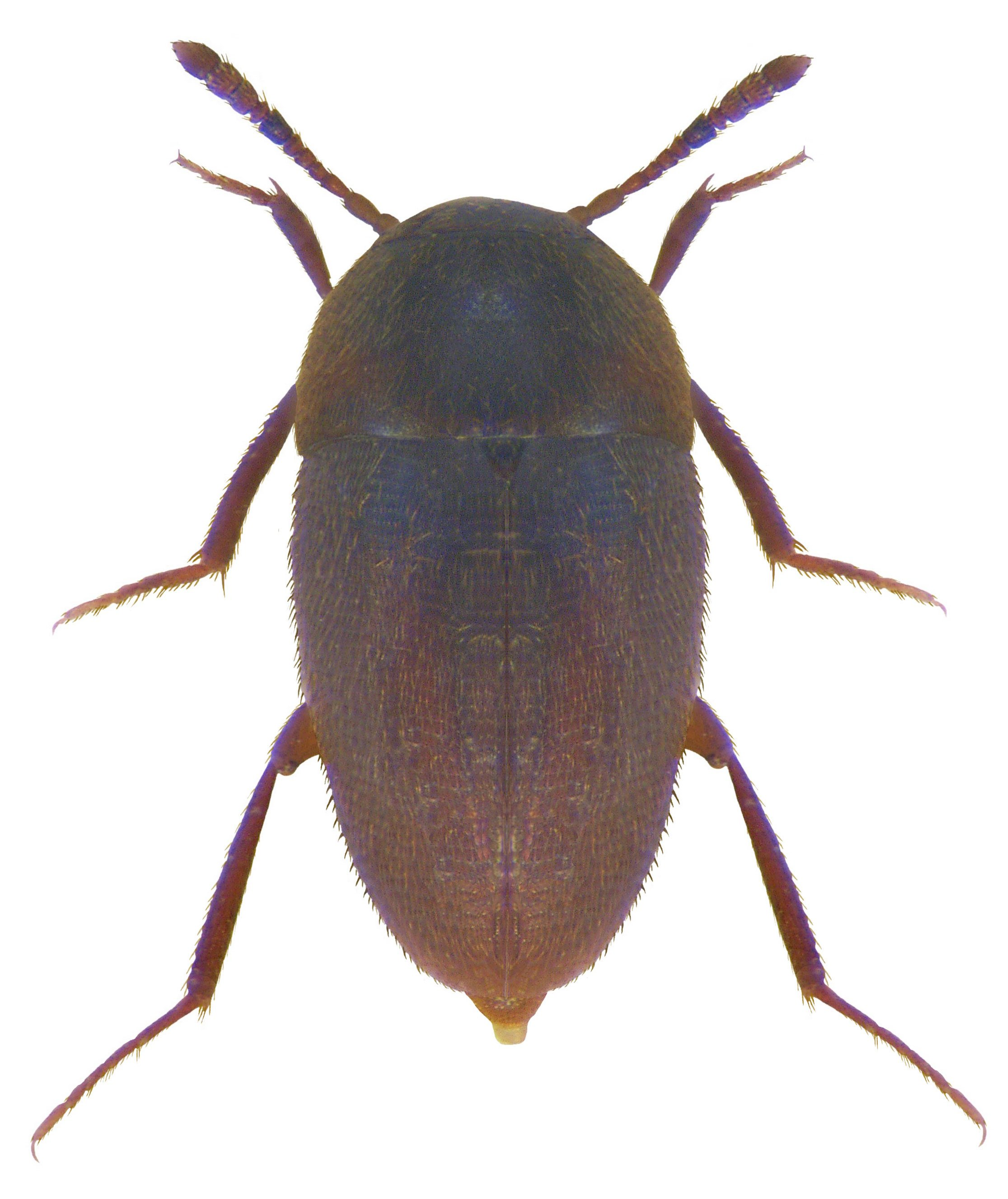 Familie: Cholevidae Grösse: 1,5-2 mm Verbreitung: Europa, selten Ökologie: nidikol in Baumhöhlen Fundort: Germania, Thüringen, Gera, Pohlitz leg.det. A.Weigel, 1999 Foto: U.Schmidt, 2009